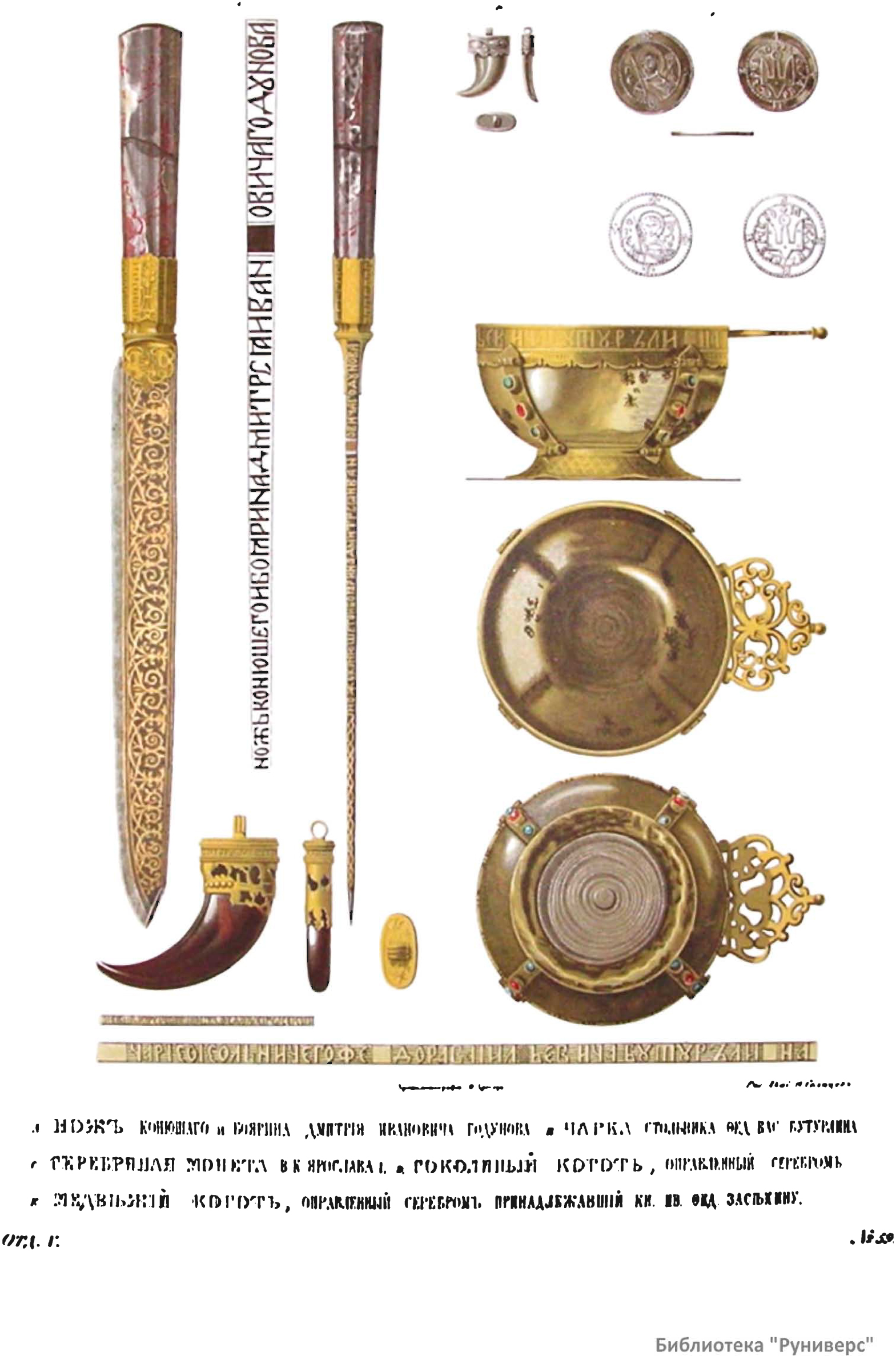 Древности Российского государства (Antiquities of Russian country), 1846—1853. Иллюстратор — Солнцев, Фёдор Григорьевич. Нож конюшаго и Боярина Дмитрия Ивановича Годунова. Рисунок Отд. V. № 59 113 Когти птичьи и медвежьи, в серебряной оправе. Рисунок Отд. V. № 59 114 "Серебро Ярославле" и чарка сокольничаго О. В. Бутурлина. Рисунок Отд. V. № 59